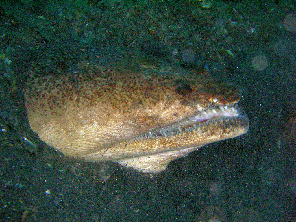 Brachysomophis cirrocheilos - Stargazer Snake Eel